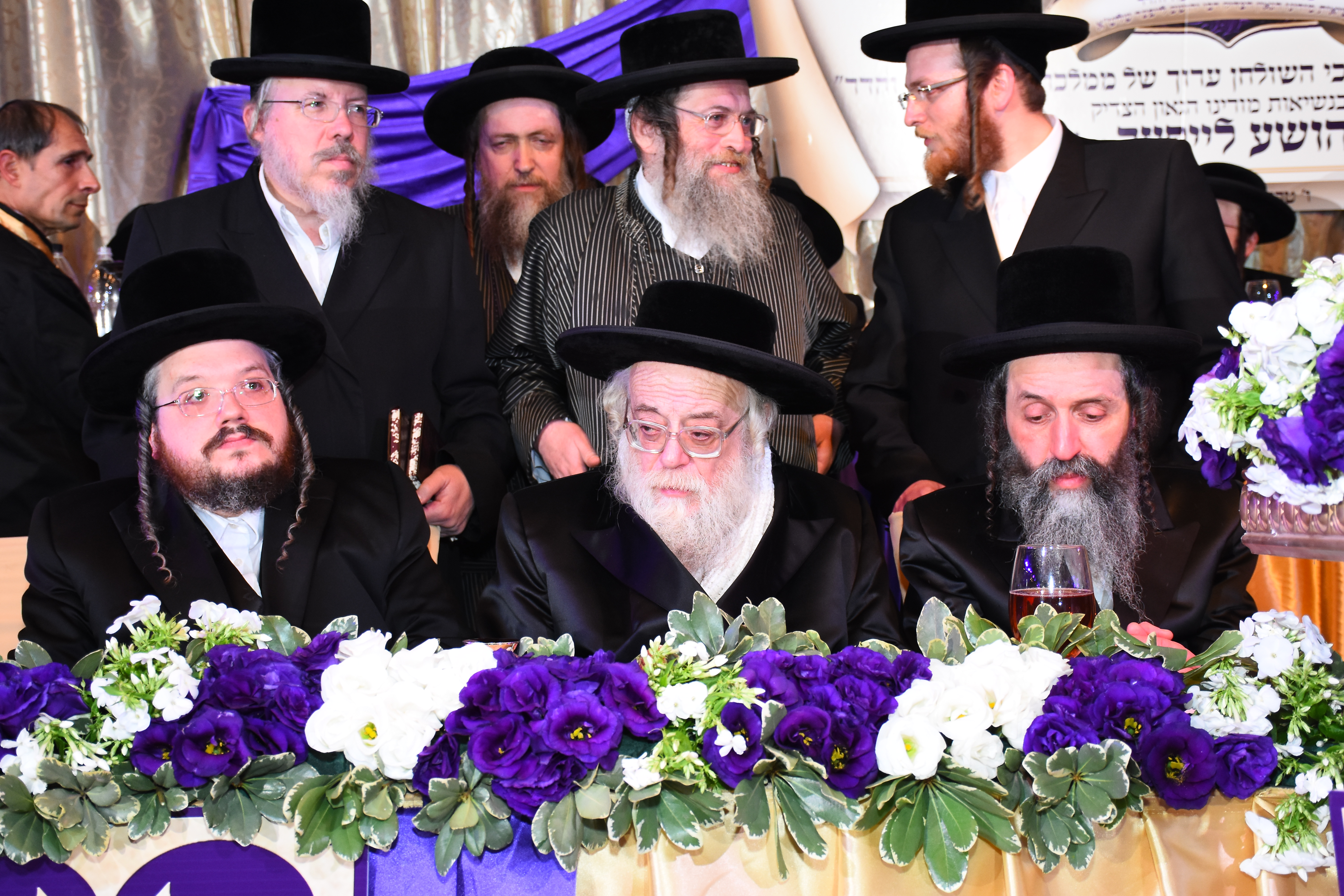 הרב יהושע לייפער - האדמו"ר מתולדות אהרן - הרב אהרן מרדכי רוקח